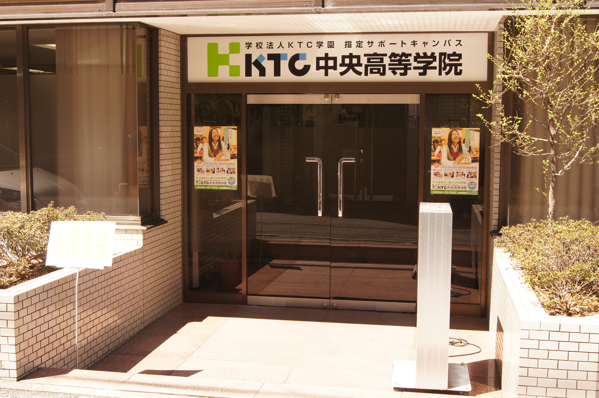 通信制サポート校KTC中央高等学院の新宿キャンパス入口。西新宿8丁目にあり、地下鉄西新宿駅からだと近い。